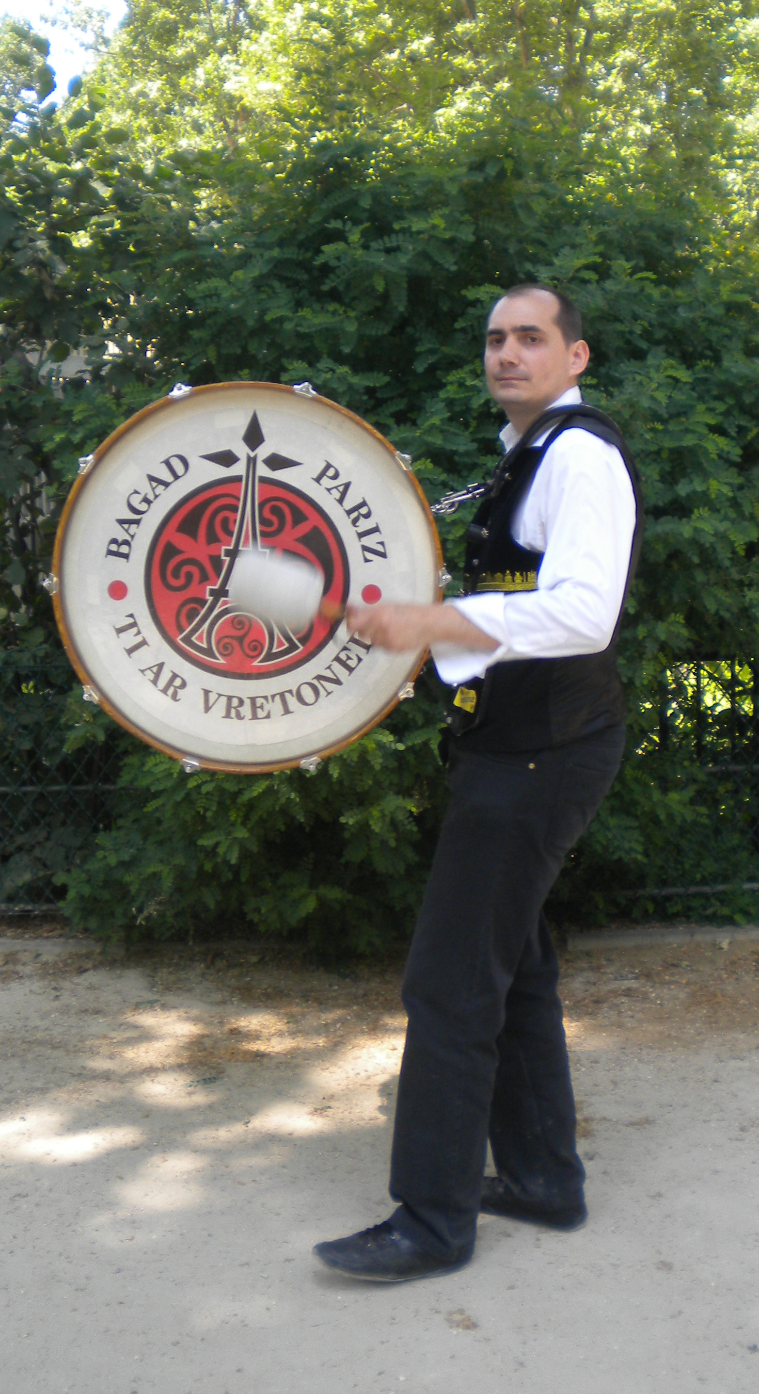 Gourdaboulinour